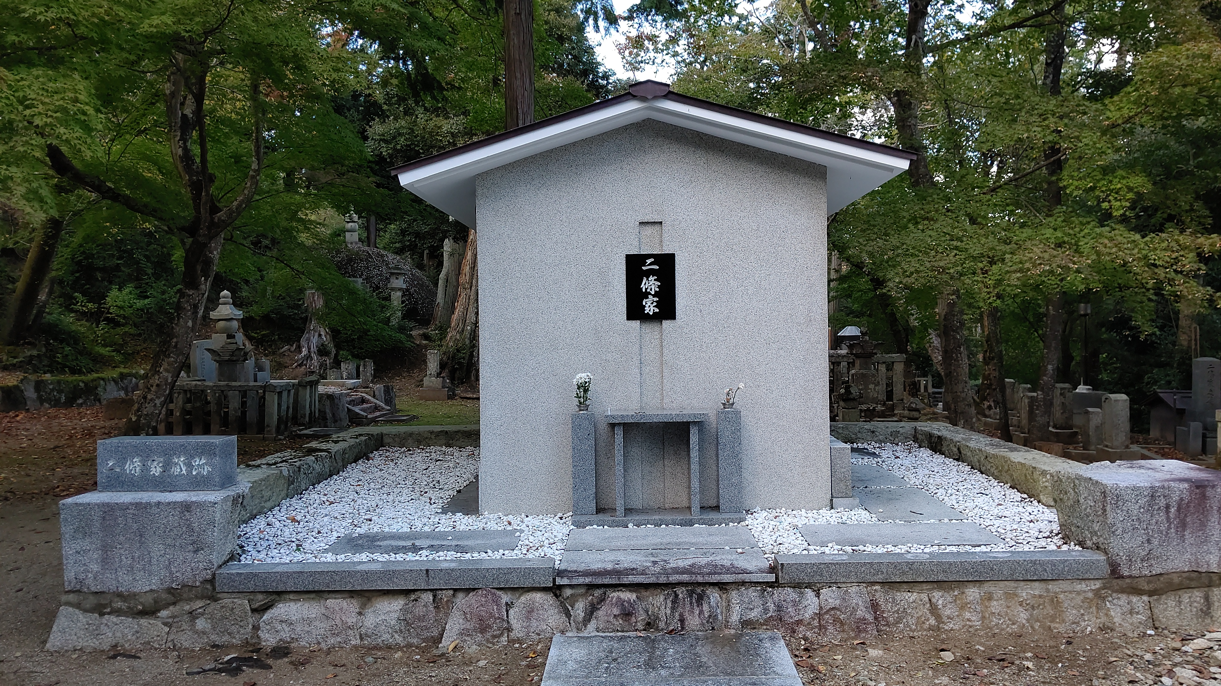 二条家の菩提寺二尊院